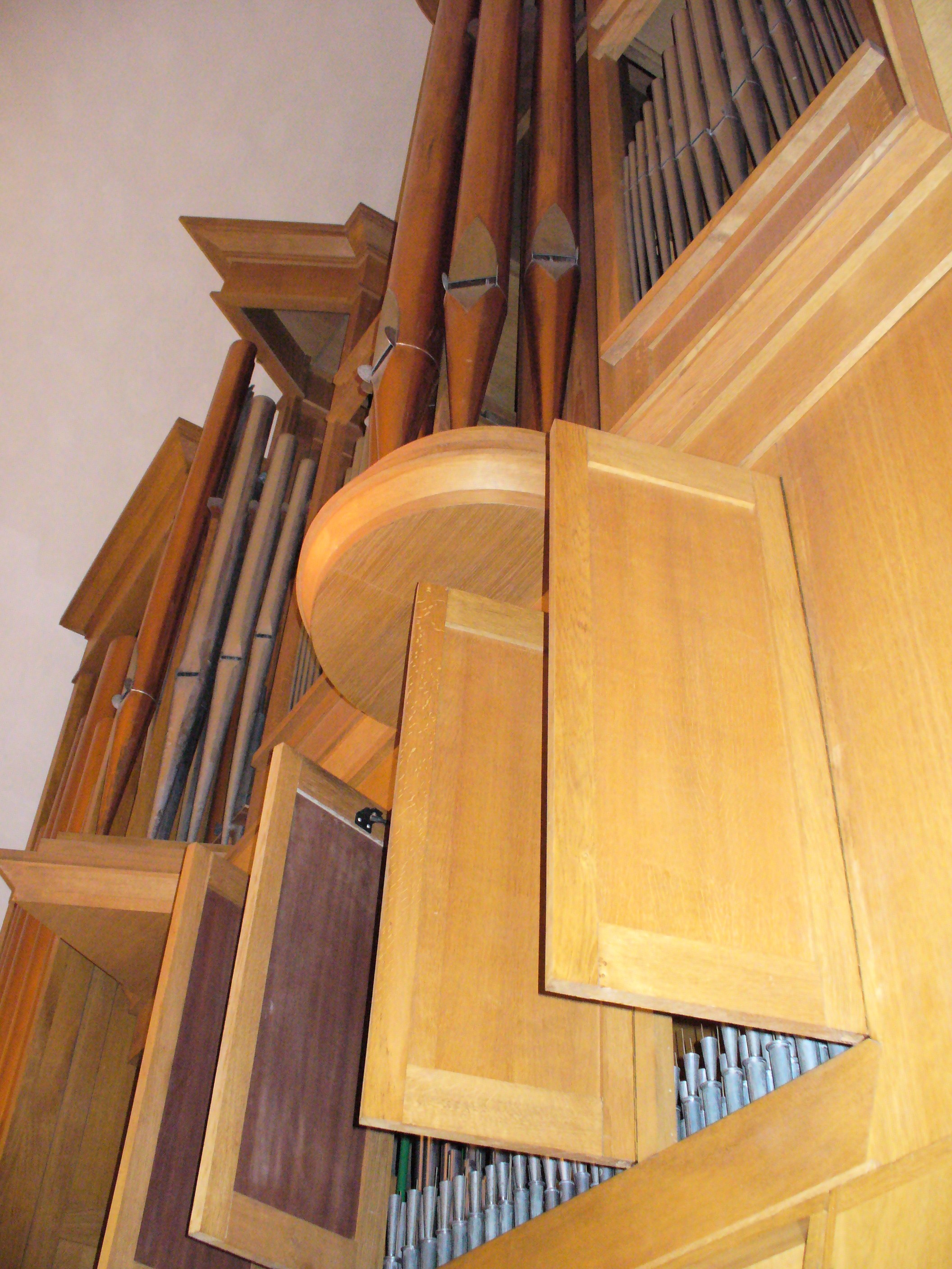 Orgue de Saint-Donat-sur-l'Herbasse (Drôme, France)